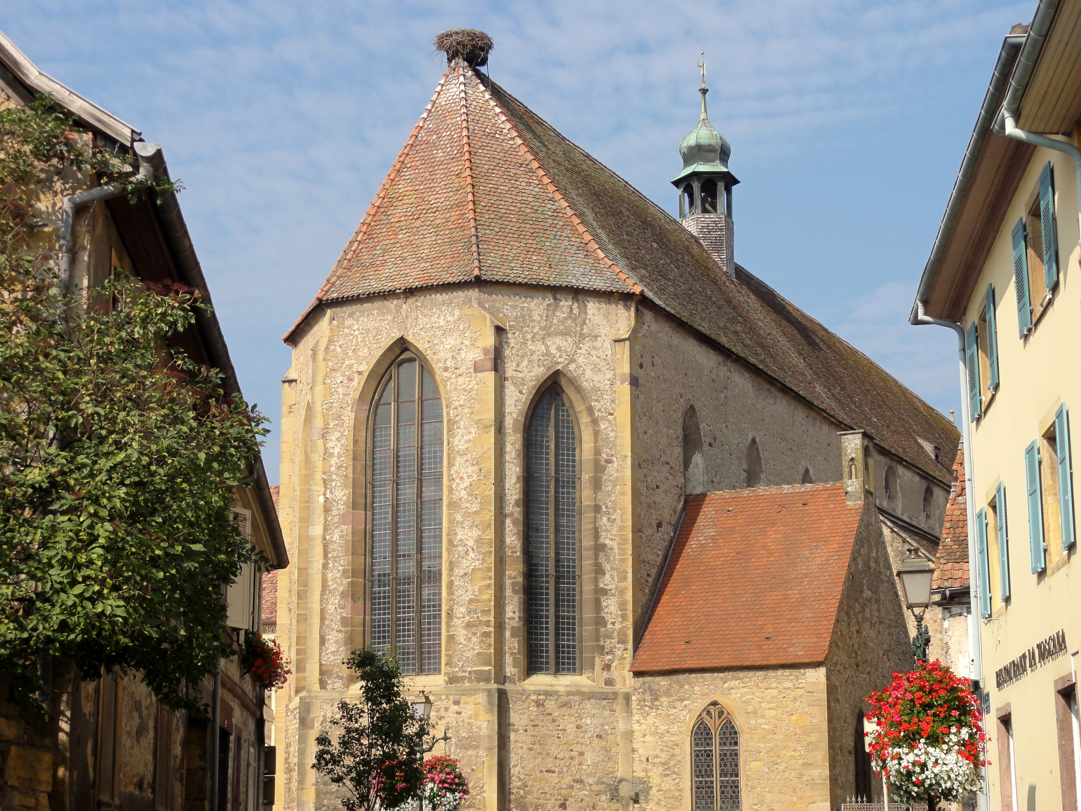 Alsace, Haut-Rhin, Rouffach, Ancien Couvent de franciscains, des Récollets (XVIIe-XVIIIe), puis tribunal (XIXe), Chapelle Sainte-Catherine d'Alexandrie (XIVe-XVIIIe), rue du Quatrième-Régiment-des-Spahis-Marocains. It is indexed in the Base Mérimée, a database of architectural heritage maintained by the French Ministry of Culture, under the references PA00085768, PA00085637 and IA68004433.